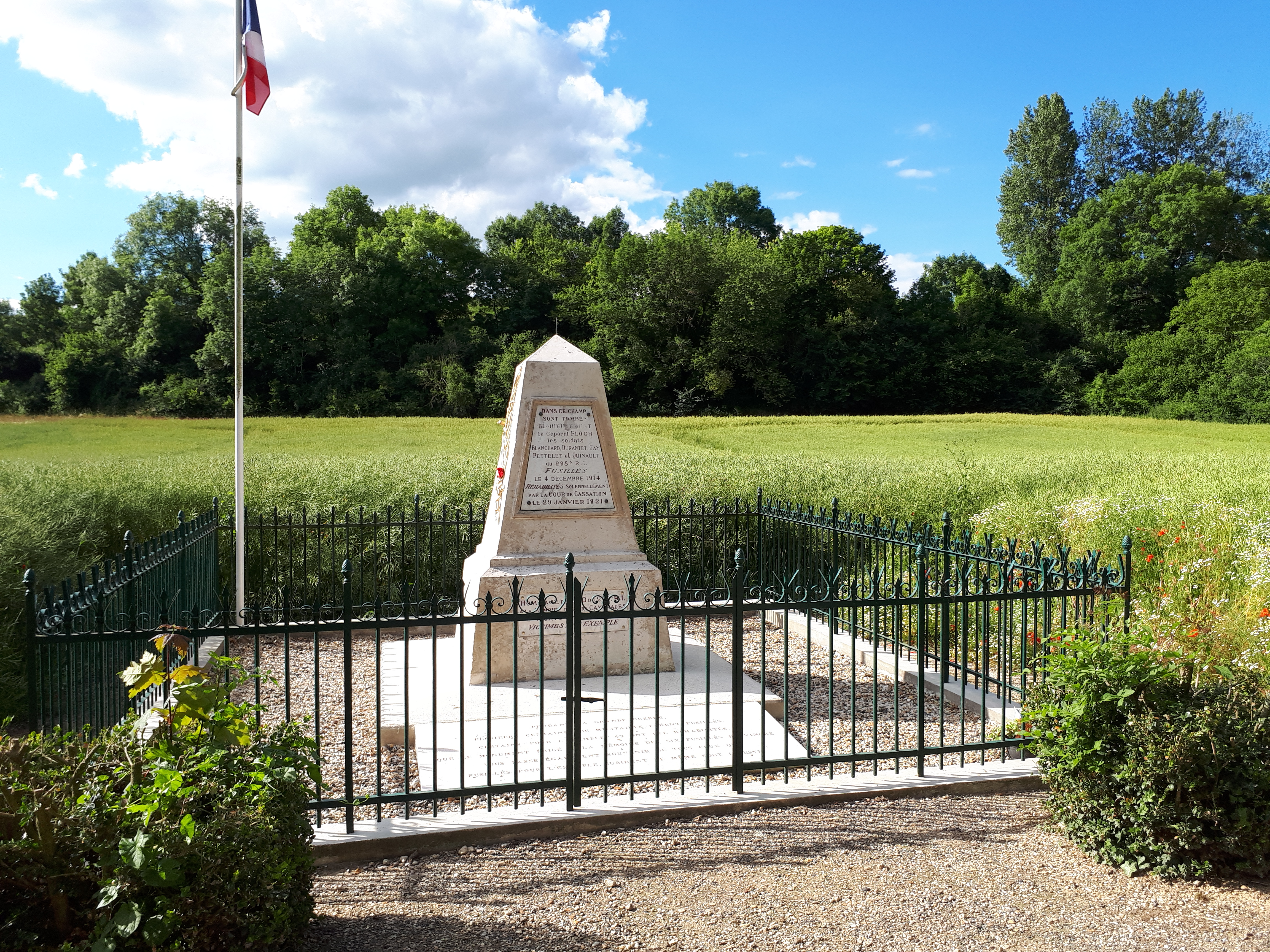 Monument des Fusillés à Nouvron-Vingré (Aisne)